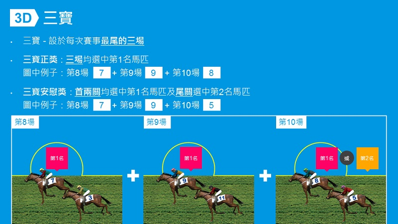 香港賽馬會三寶